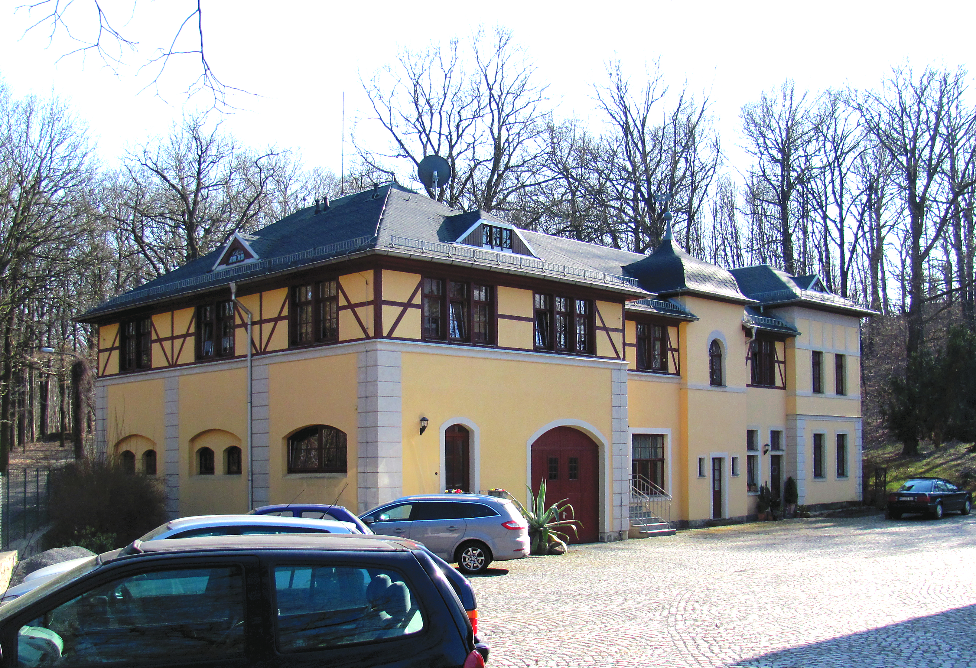 Radebeul, Frauen-Genesungsheim „Alt-Wettinhöhe“, Personalwohnheim und Heizhaus